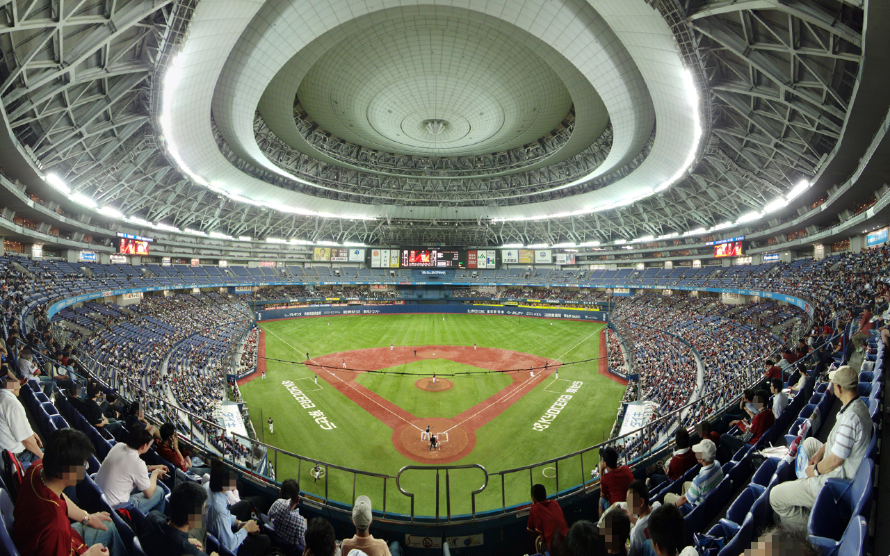 京セラドーム大阪、内野上段席より。